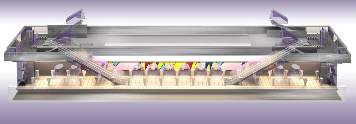 Wielobranżowy Projekt Koncepcyjny centralnego odcinka II lini metra w Warszawie